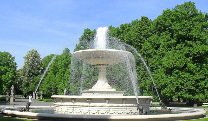 Warszawa, Ogród Saski